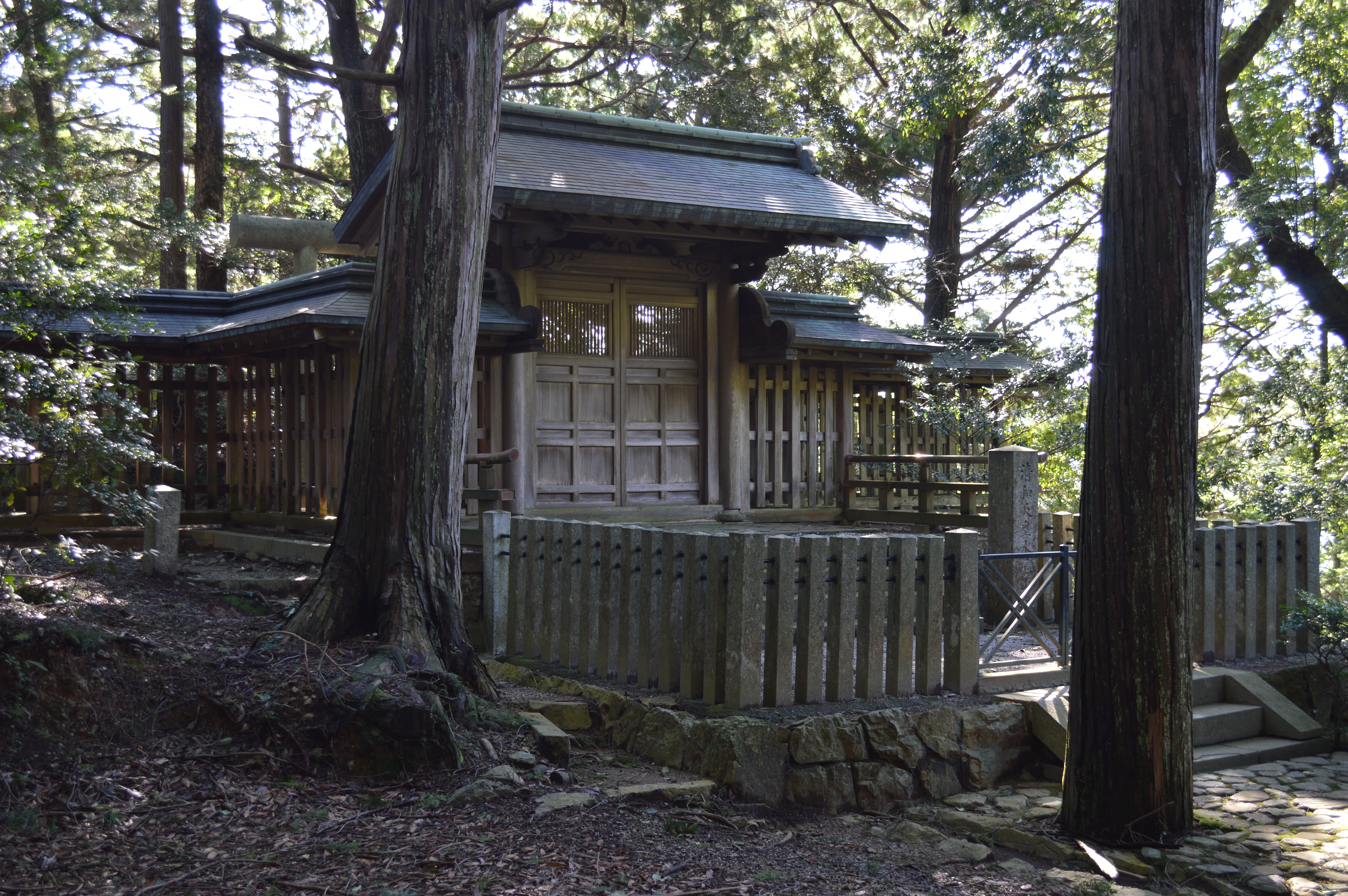 京都市右京区嵯峨水尾にある清和天皇山陵